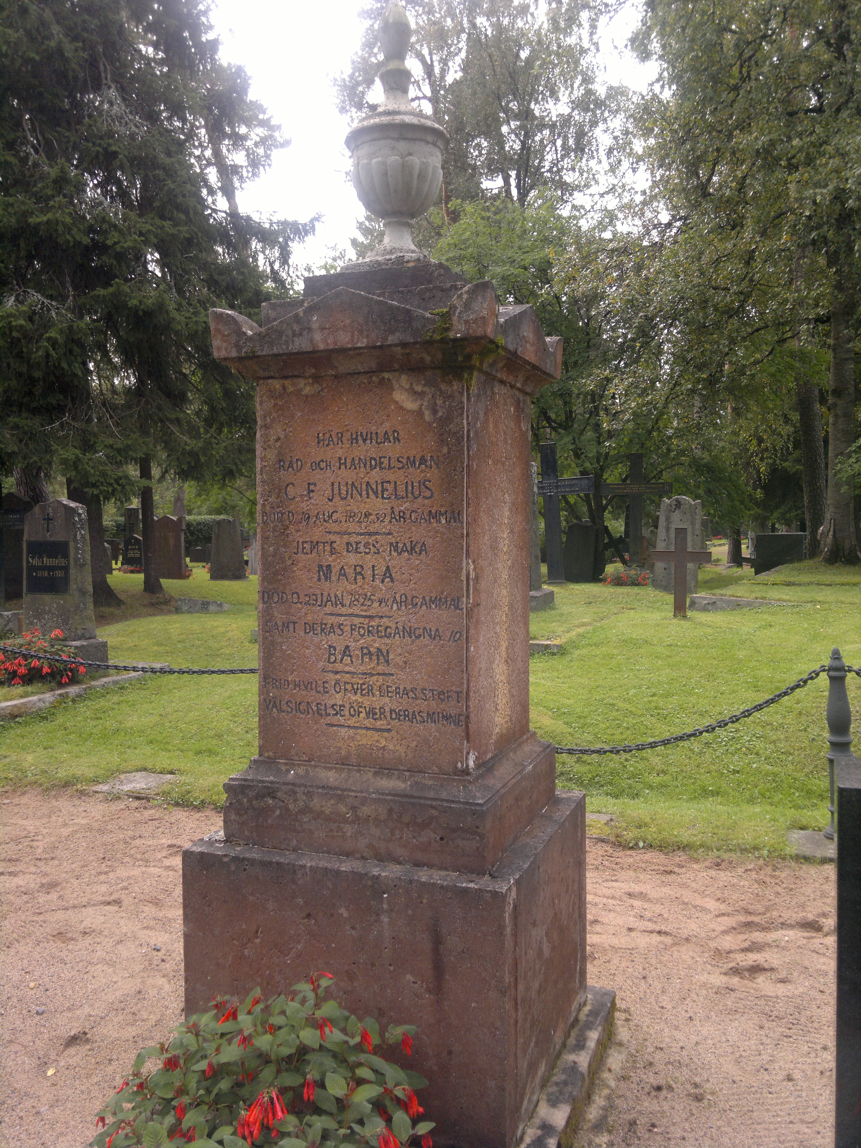 Merikapteeni C F Junneliuksen sukuhauta